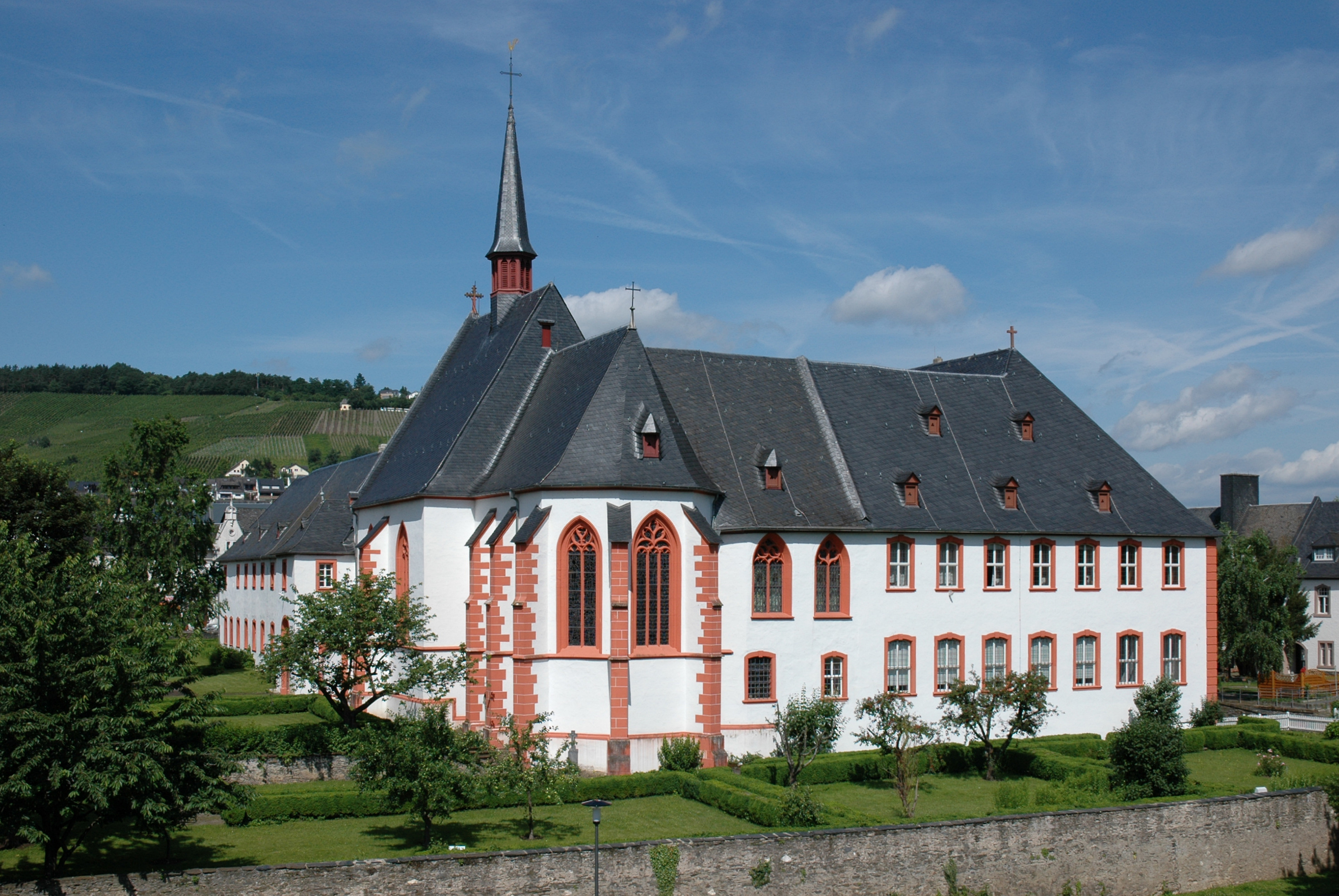 Cusanusstift in Bernkastel-Kues, Ansicht von Osten This is a photograph of an architectural monument.It is on the list of cultural monuments of Bernkastel-Kues